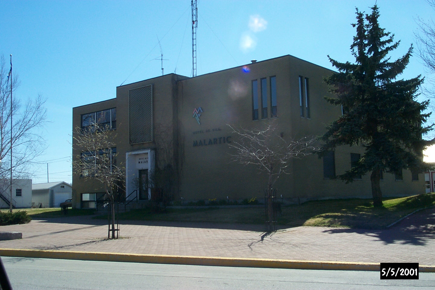 Photo de l'hôtel de ville de Malartic